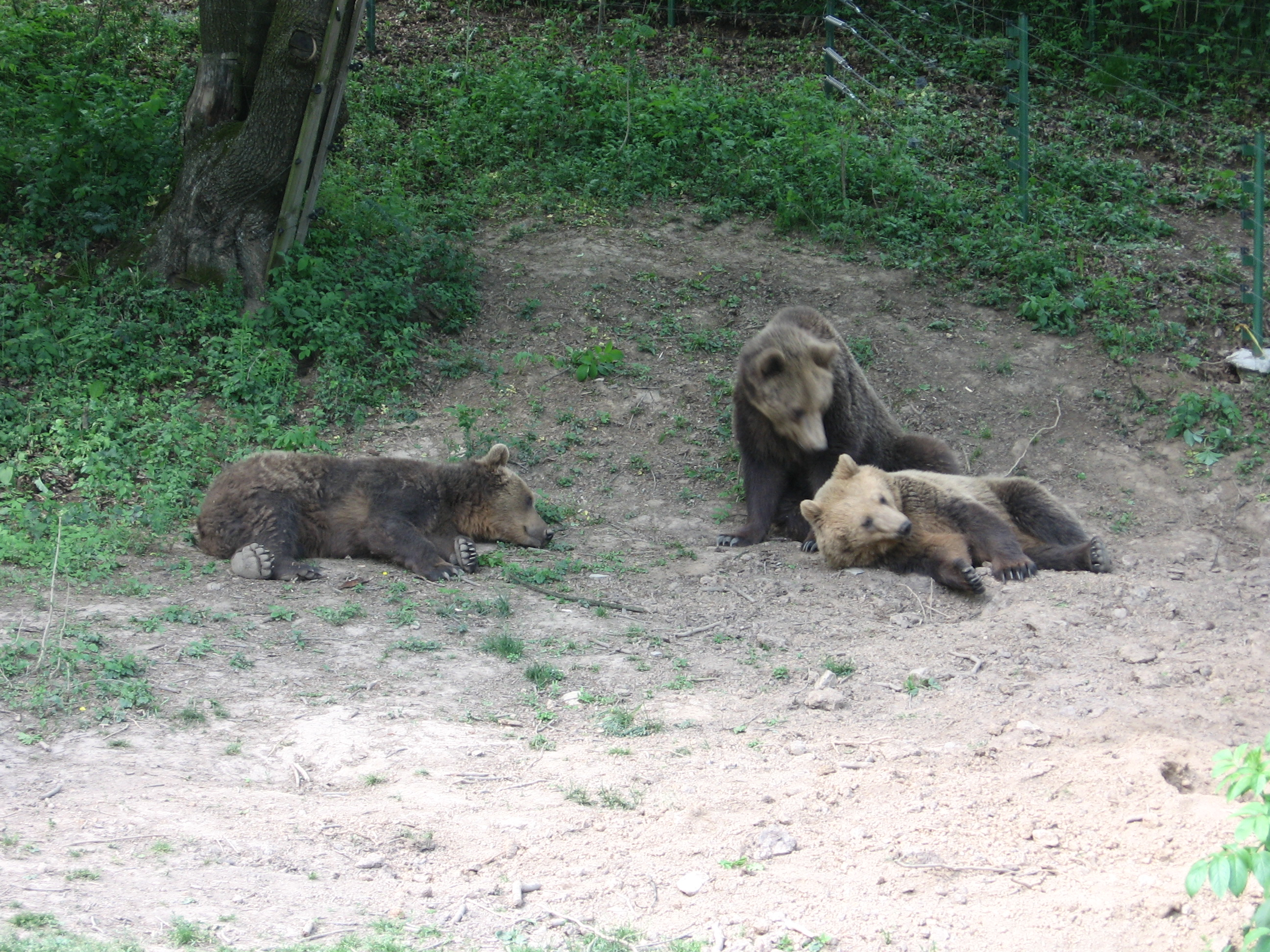 Košická zoologická záhrada